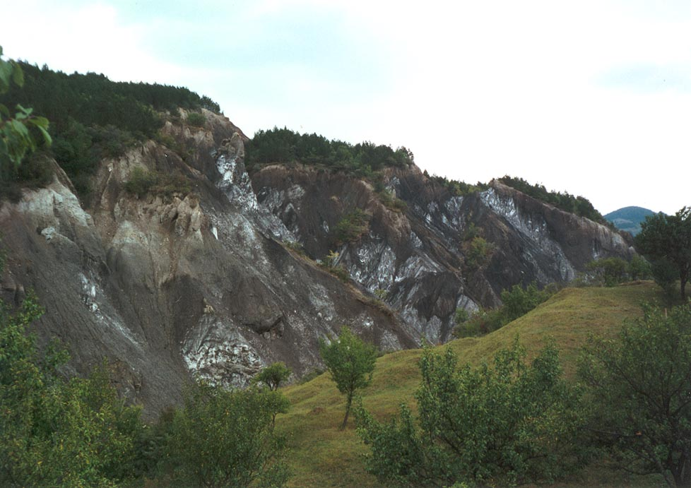 Salt plateau Meledic near Mînzăleşti (Buzau County)